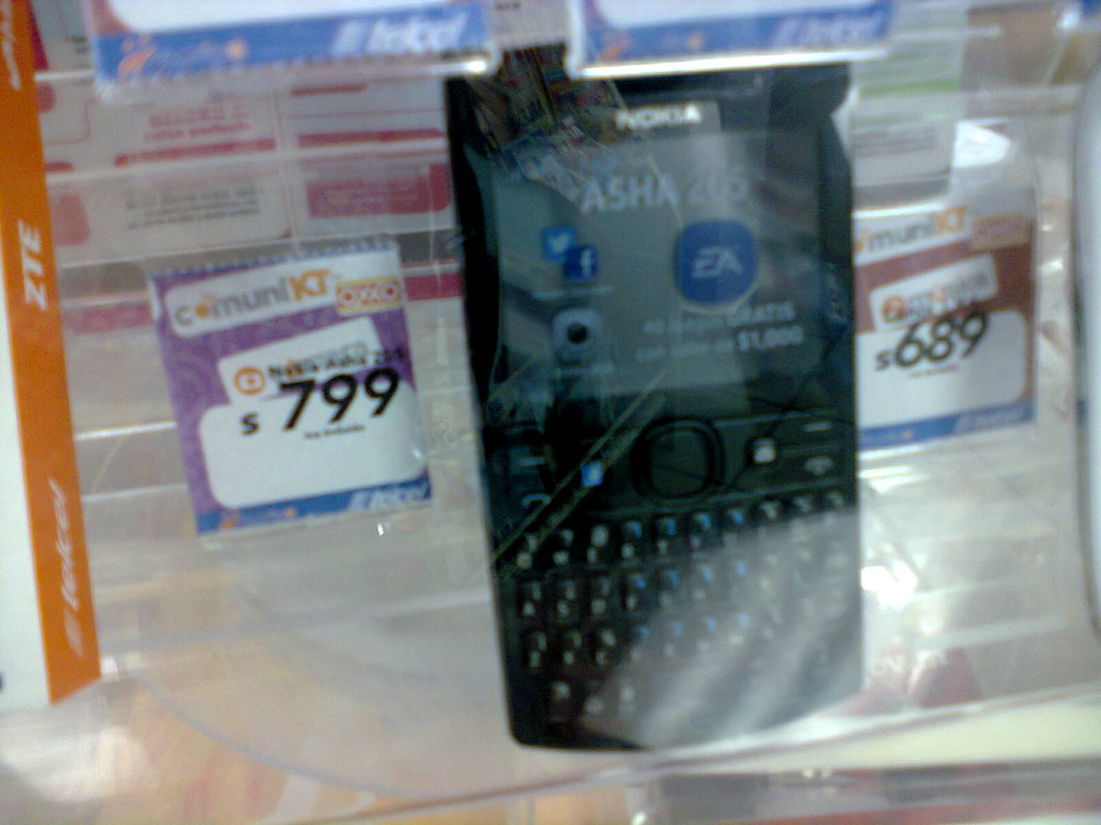 Telefono Sucesor Del Asha 201 Disponible En Varios Oxxos